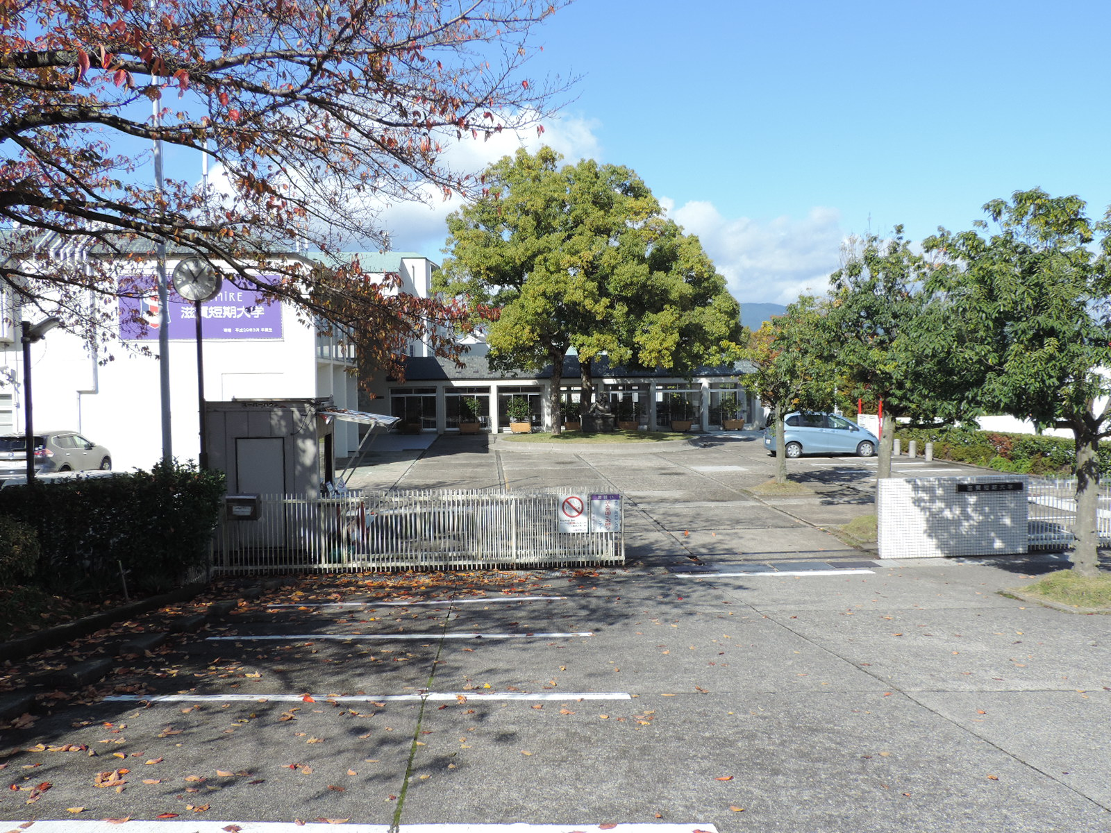 滋賀短期大学。2017年撮影